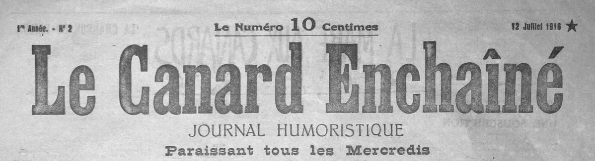 Titre de page du journal Le Canard Enchaîné sur le numéro 2, 12 juillet 1916.